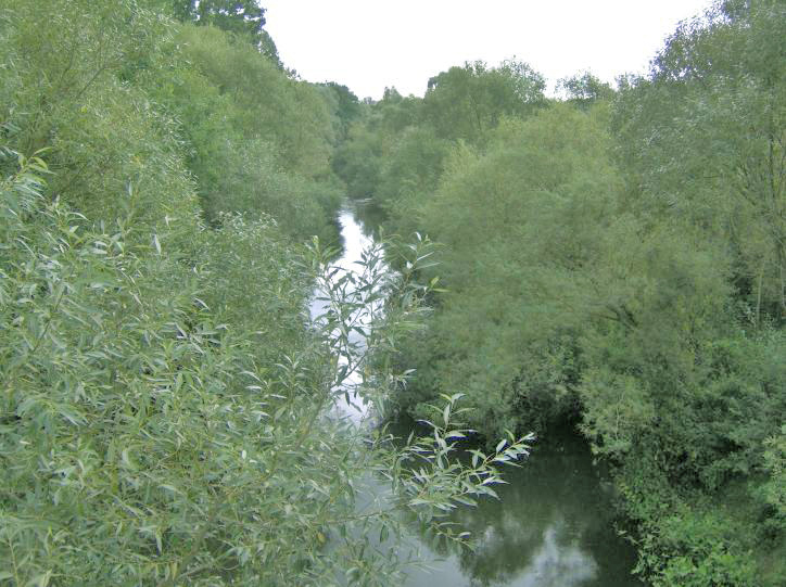 *Sujet:Ina Source:Eege Foto vum Wikipedysta:Soczewa